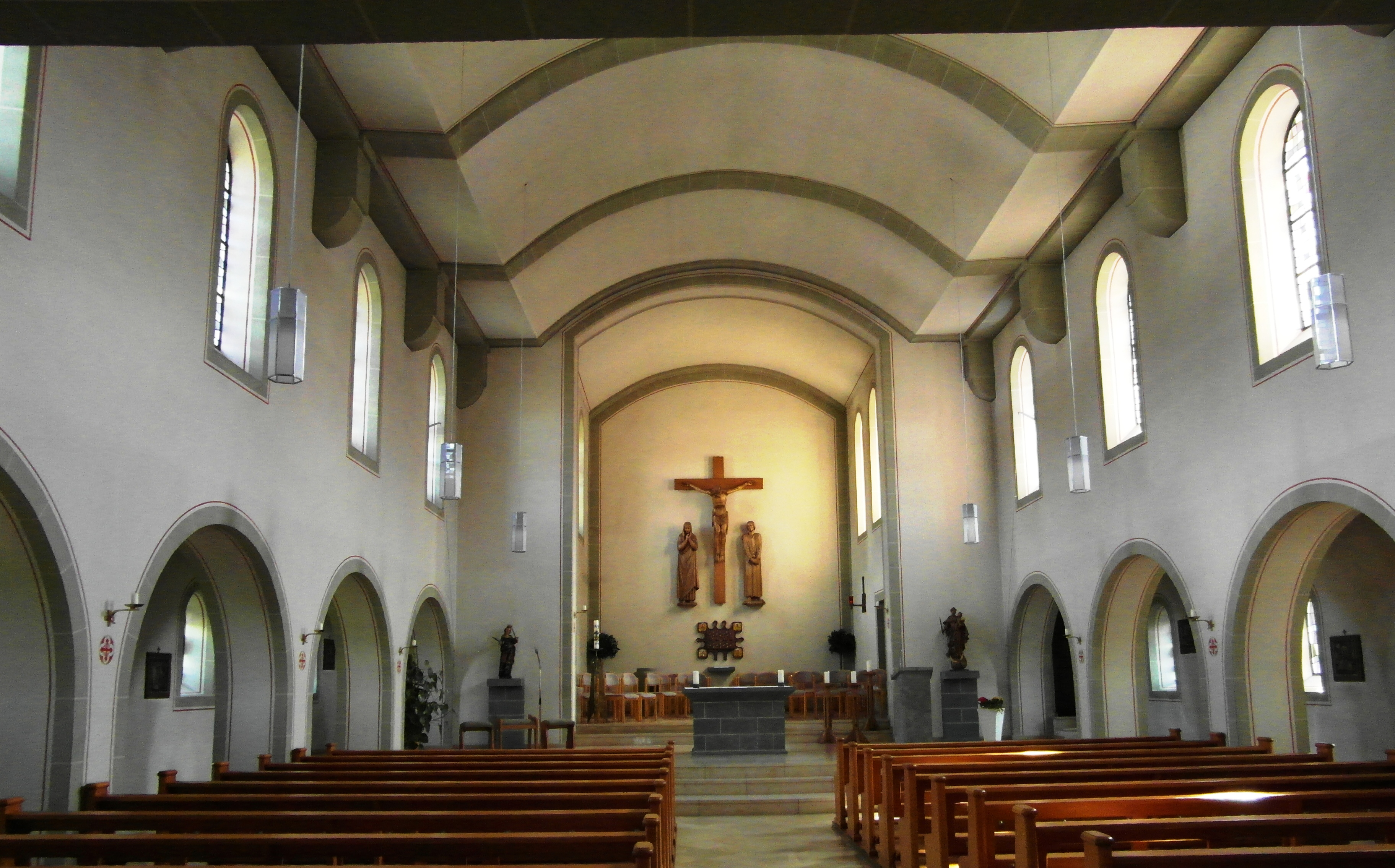 St. Lucia - Oberveischede Saalkirche Innenansicht